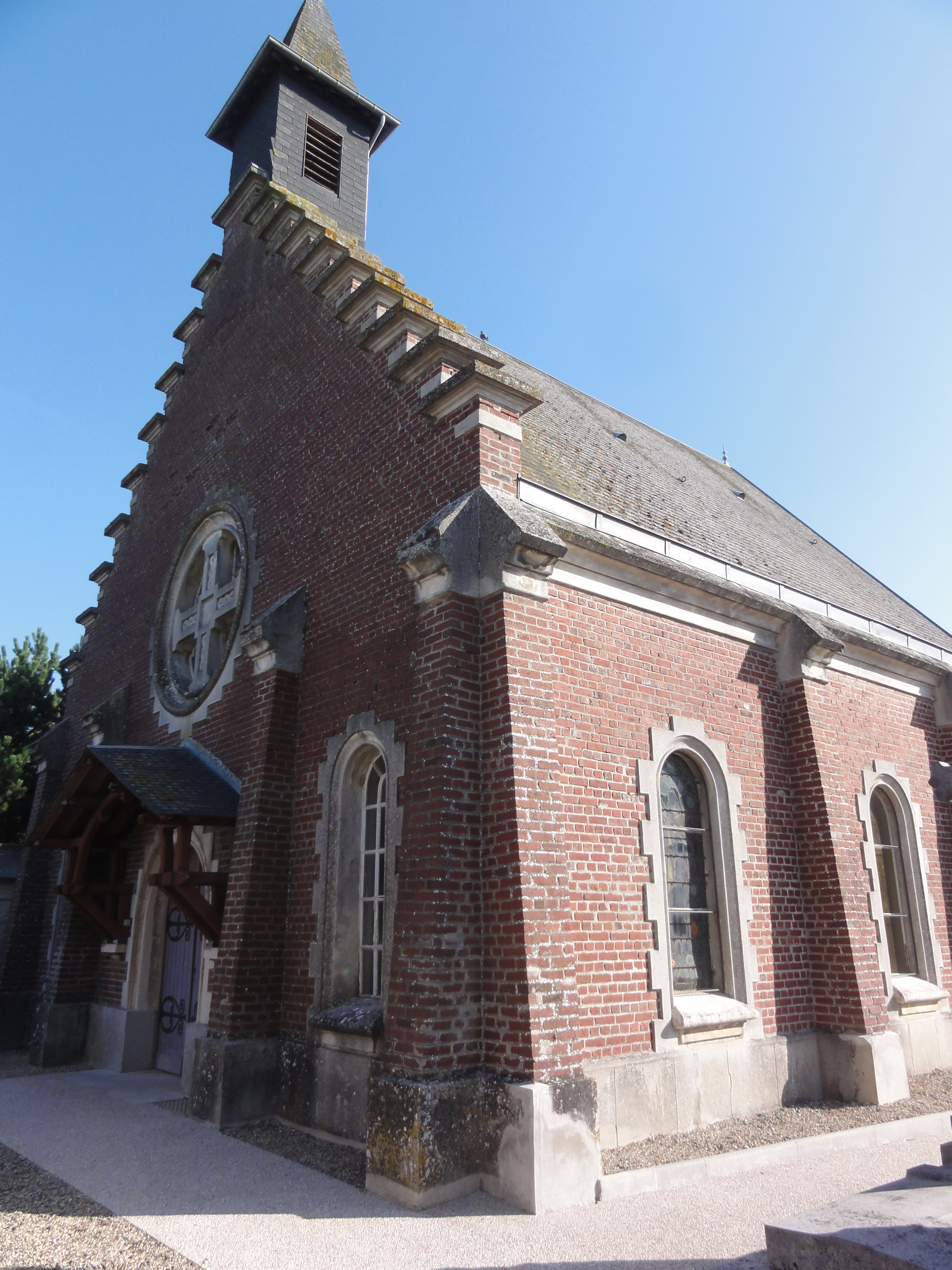 Mesnil-Saint-Laurent (Aisne) église